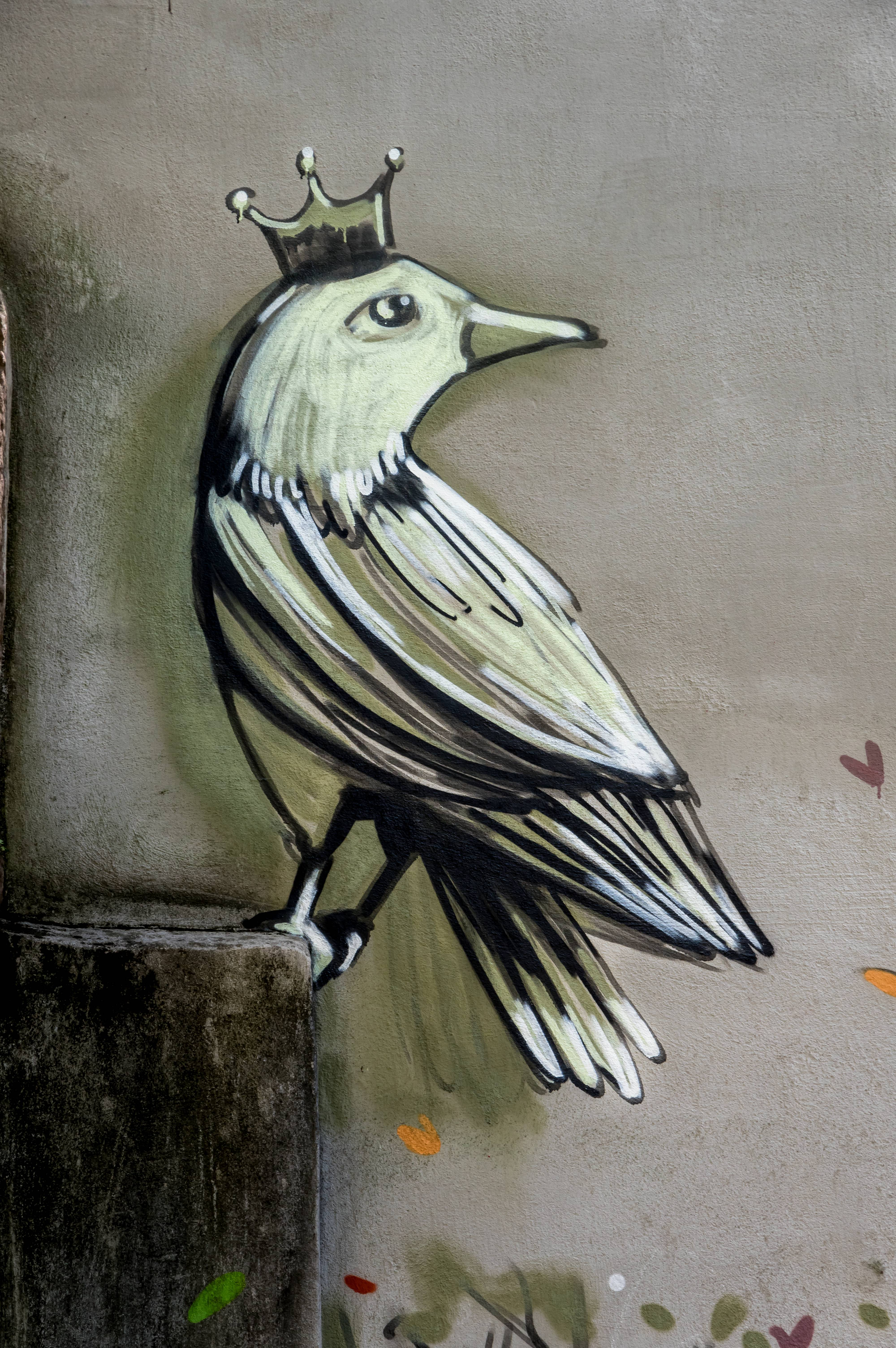 Die neue Ubi Bibliothek nach der Eröffnung Die Street Art und Graffitikünstlerin Alice Pasquani aus Rom verschönert den Spielplatz am Augustinerplatz am 30. und 31. Juli 2015 im Auftrage des Vereins Kulturaggregat aus Freiburg.